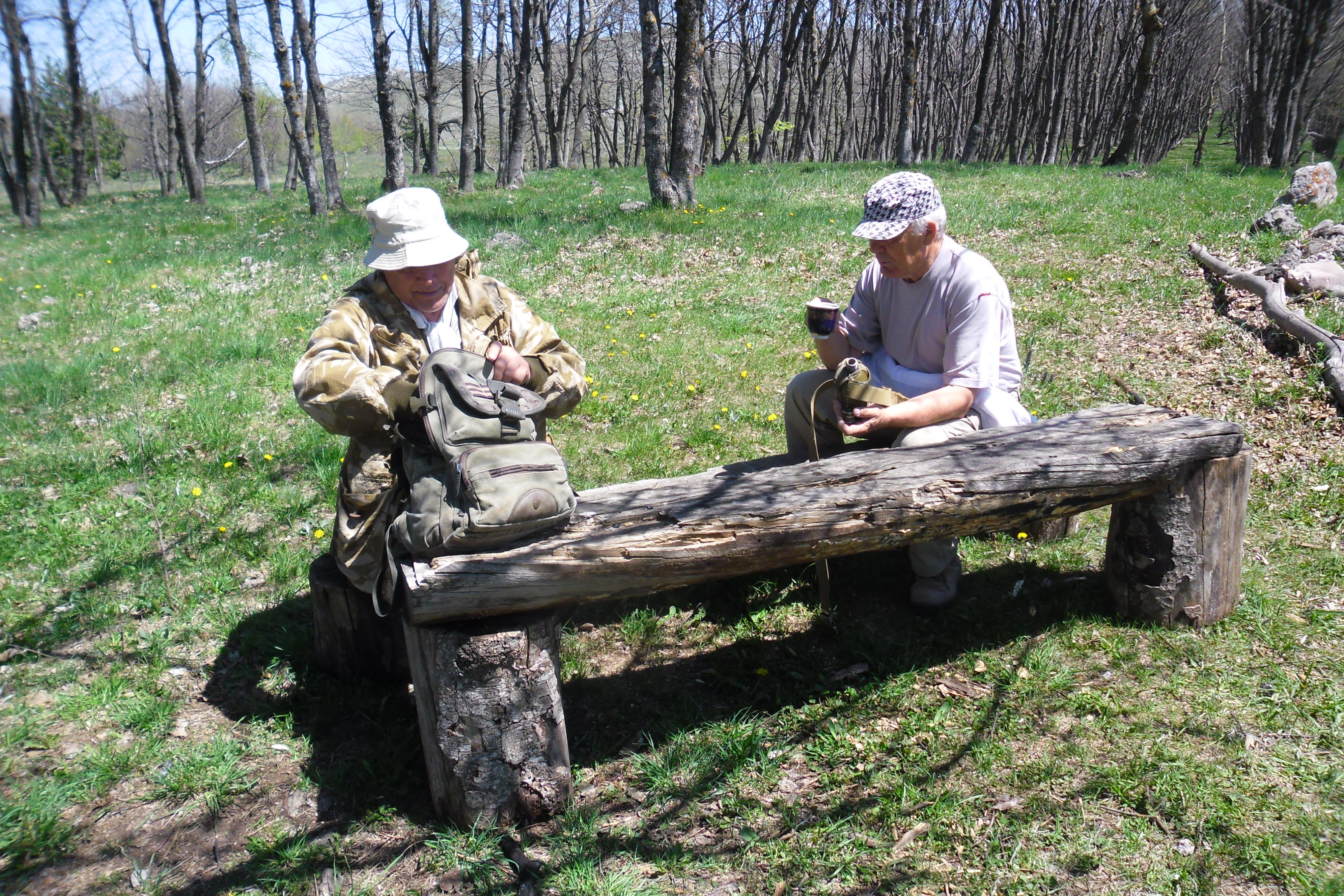 Привал